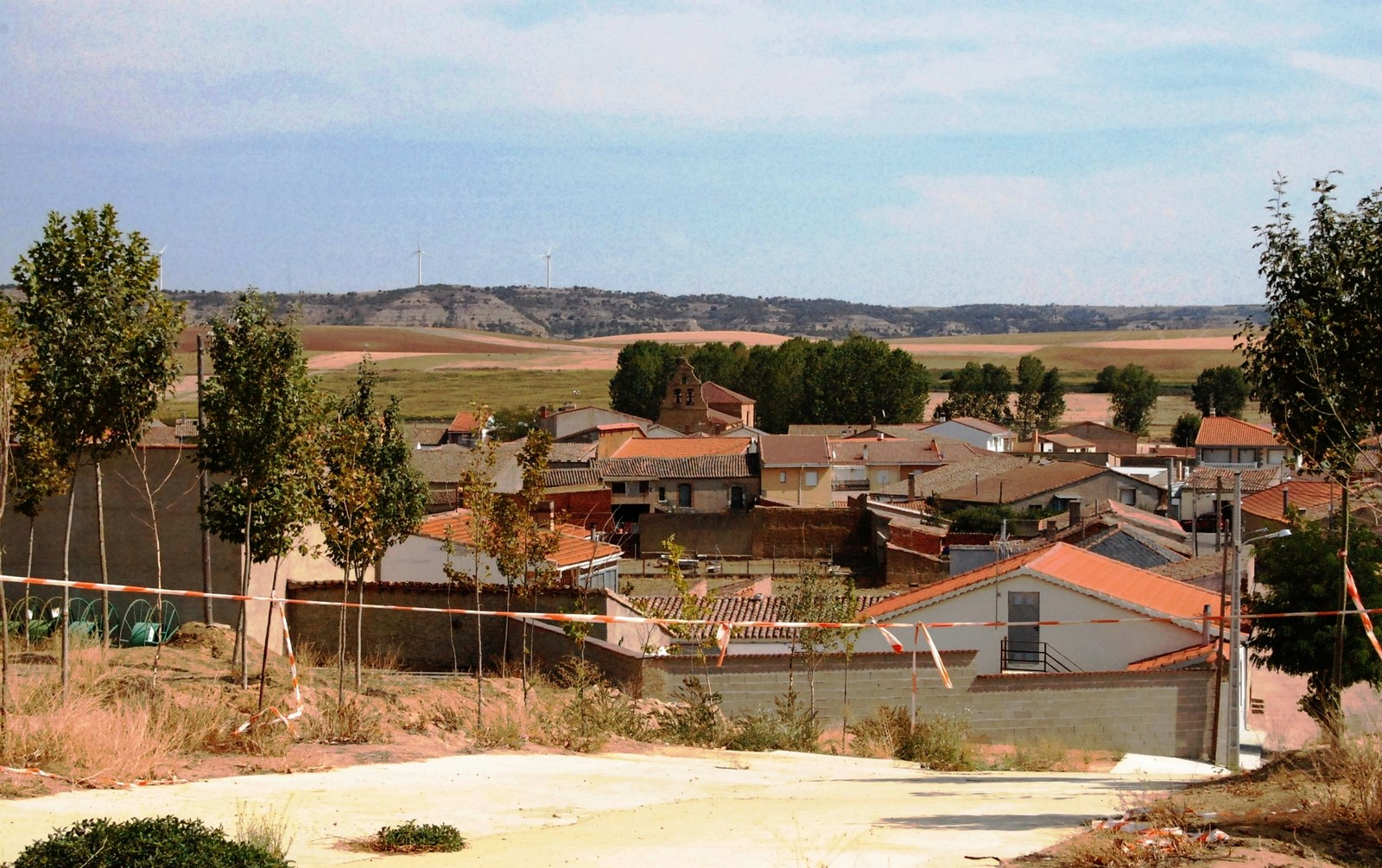 49157 Madridanos, Zamora, Spain